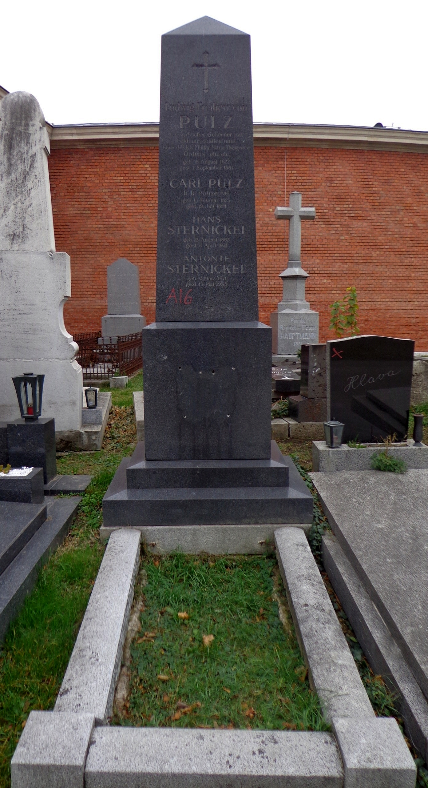 Wiener Zentralfriedhof - Gruppe 13A, Grab des k.u.k. Feldmarschallleutnants Ludwig Freiherrn von Pulz, Ritter des Militär-Maria-Theresien-Ordens. Wie die Abbildung zeigt, war das im Jänner 2002 noch vorhandene metallene Wappenrelief im November 2017 bereits entfernt.